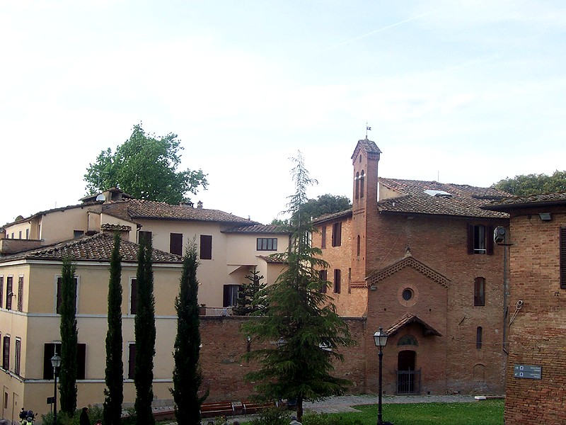 Siena - Piazza Manzoni